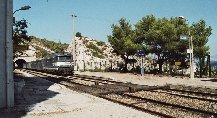 Une rame TER Marseille-Miramas entre en gare de Niolon.